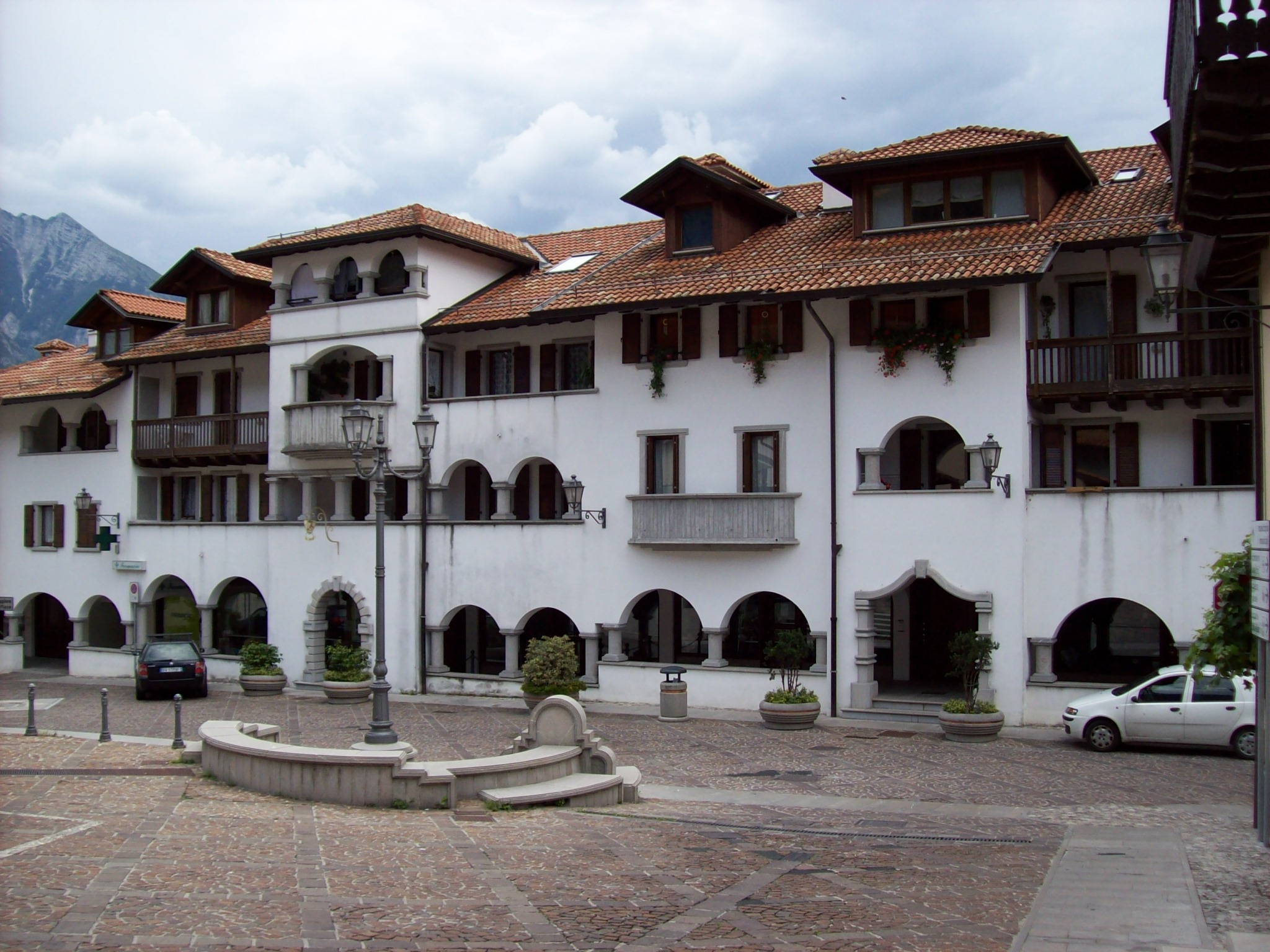 Amaro (UD-Italy) piazza